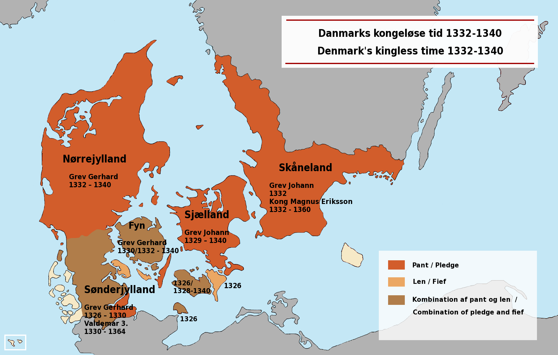 Den kongeløse tid i Danmark; kilde: Sønderjyllands historie, bind 1, Aabenraa 2008